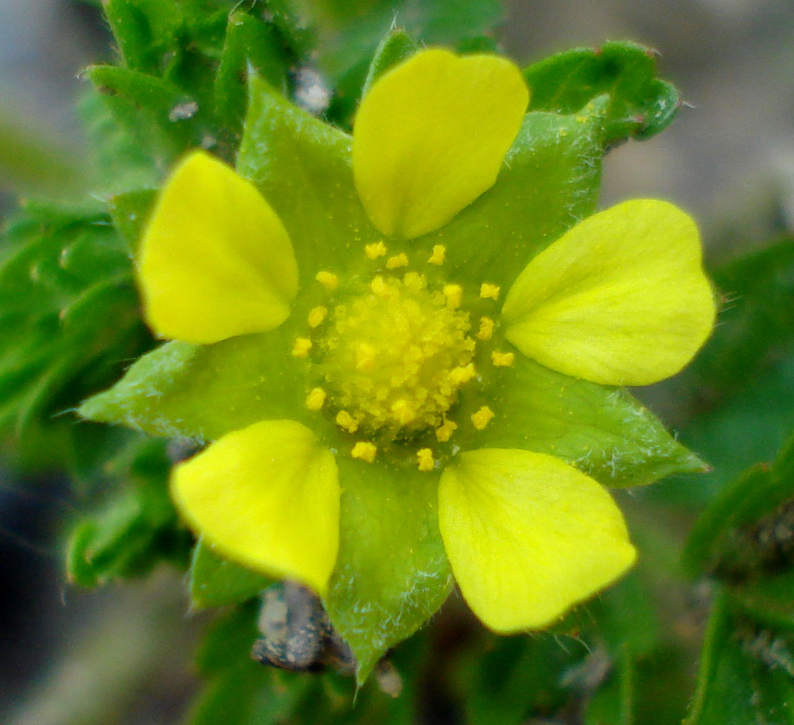 Potentilla supina (Unterfranken, Germany)